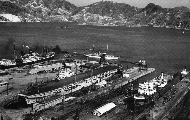 Taikoo dockyard